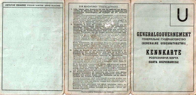 З такими документами ходили українці в Генеральному Губернаторстві